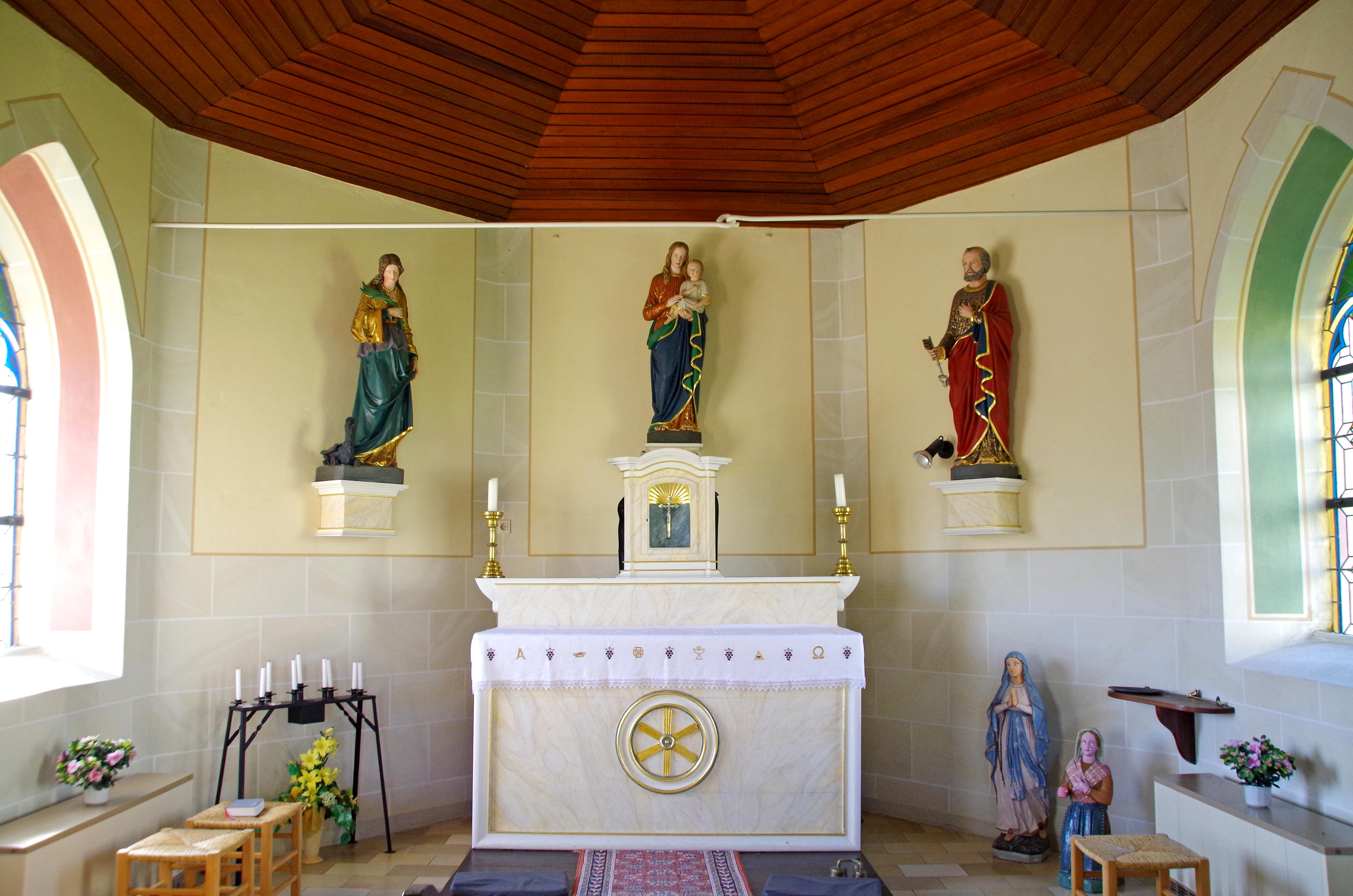 St. Peter und St. Margarethe (Laudesfeld), Innenraum